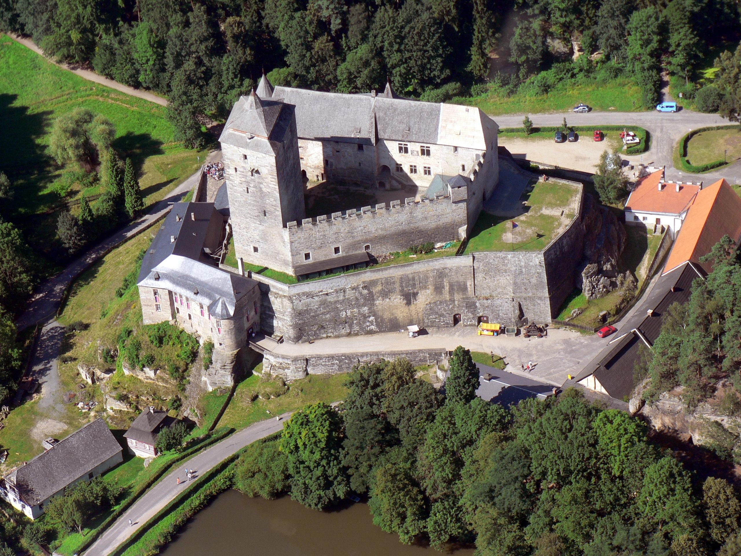 Letecký pohled na hrad Kost